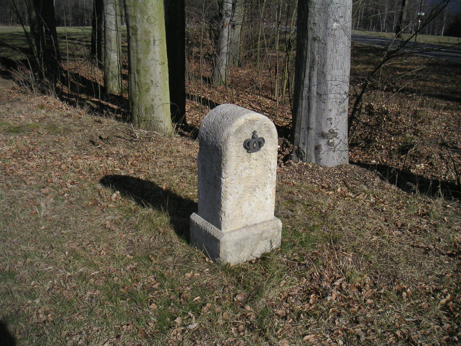 Postmeilenstein in 08491 Buchwald/Vogtland